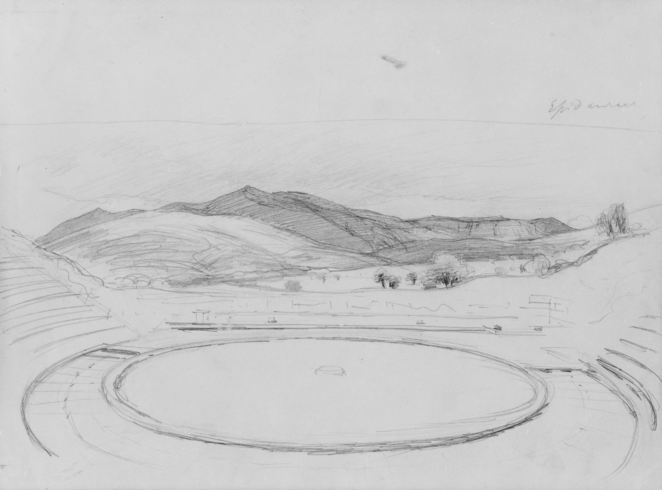 Drawing; Drawings